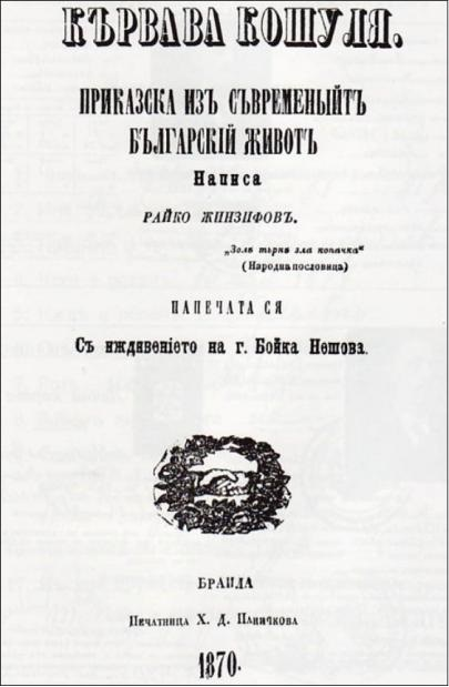 Кървава кошуля